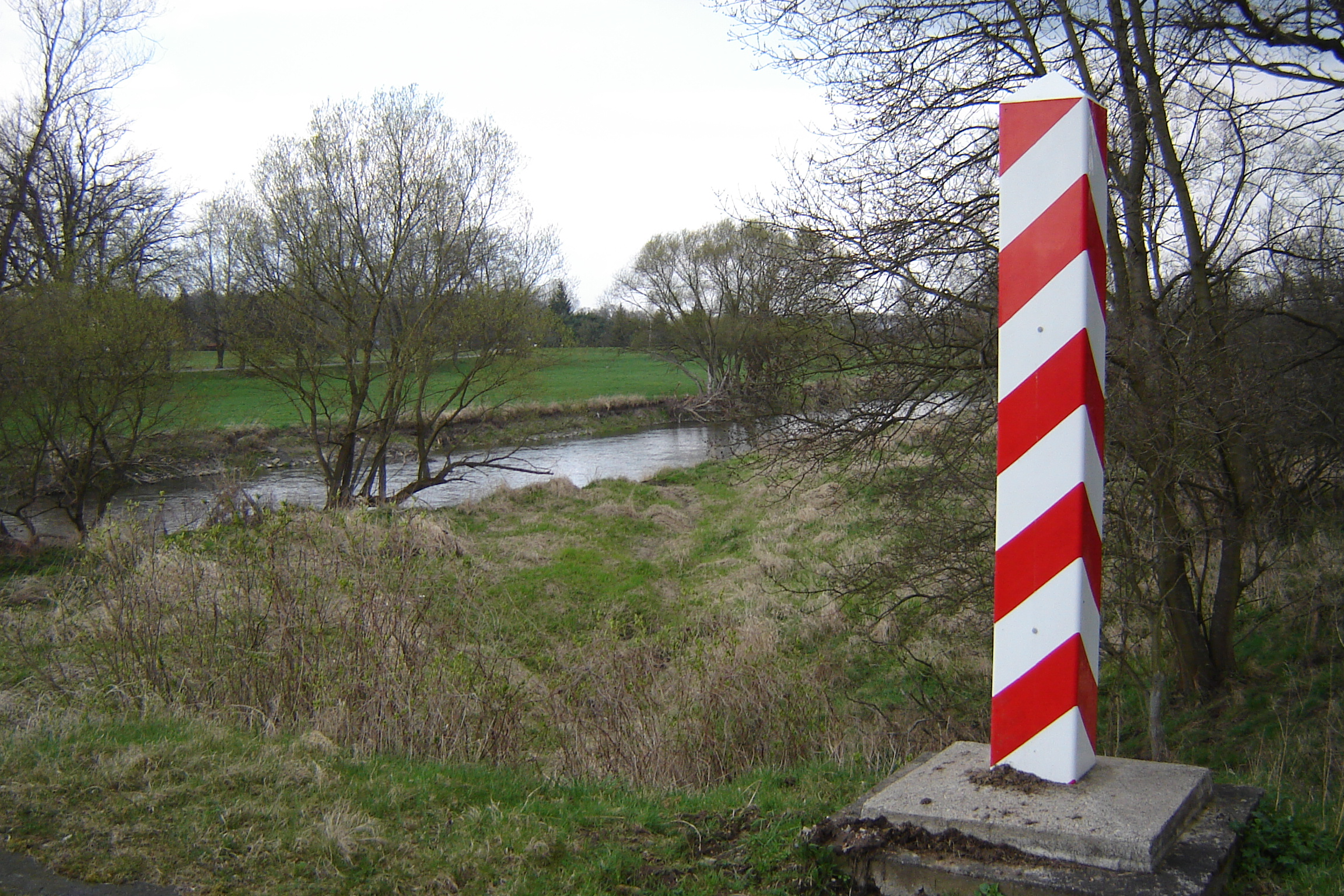 Nad Nysą